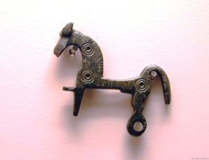 Fíbula celta (caballito)